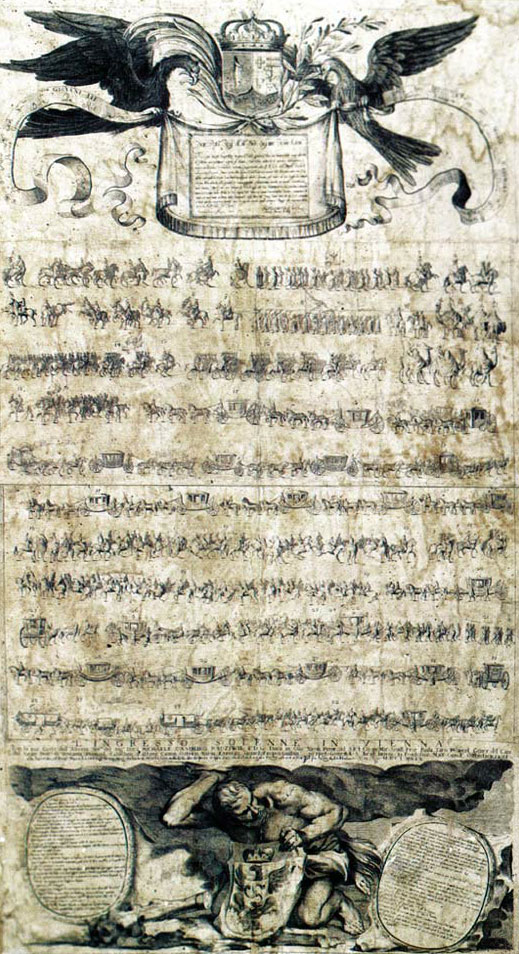 Беларуская (тарашкевіца): Уезд пасольства Міхала Казімера Радзівіла (Michał Kazimier Radzivił) ў Вену